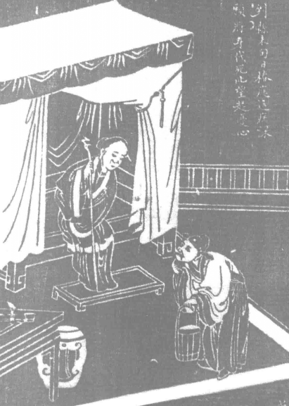 中文（香港）: 清朝作品《绵竹墨拓挂屏二十四孝图》中关于“尝粪忧心”故事的艺术品